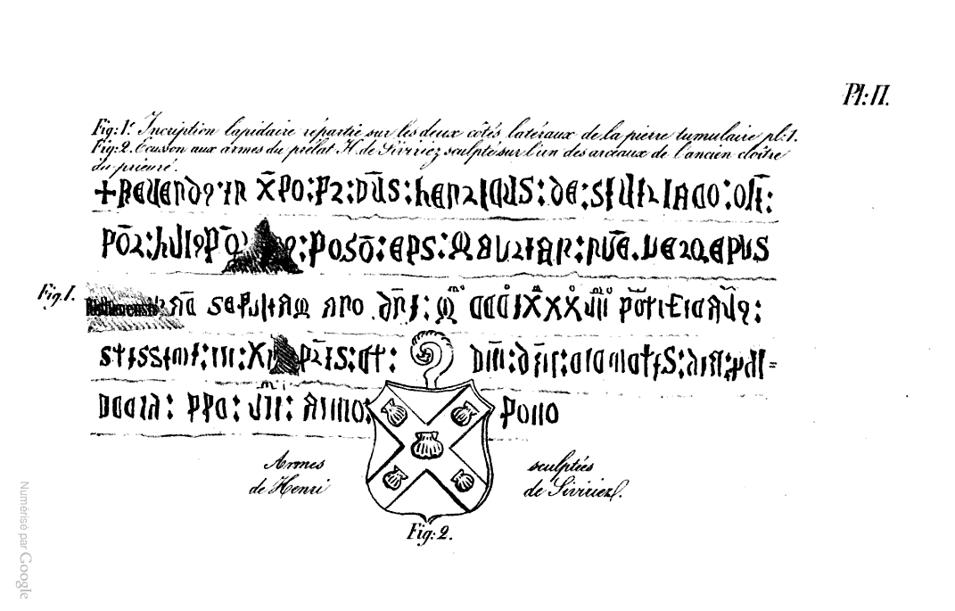 Inscription de la pierre tombale d'Henri de Sivirie